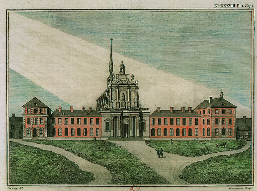 Chartreuse d'Aubevoye - Inventaire Millin - publié en 1792.